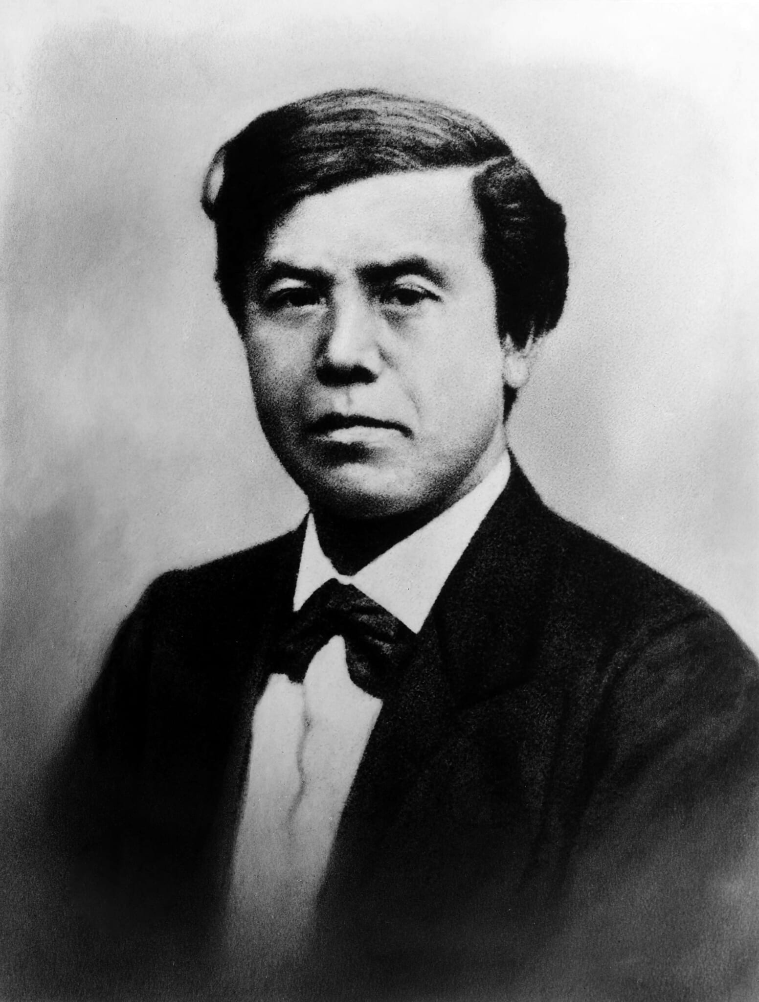 Portrait of Kido Takayoshi (木戸孝允, 1833 – 1877)